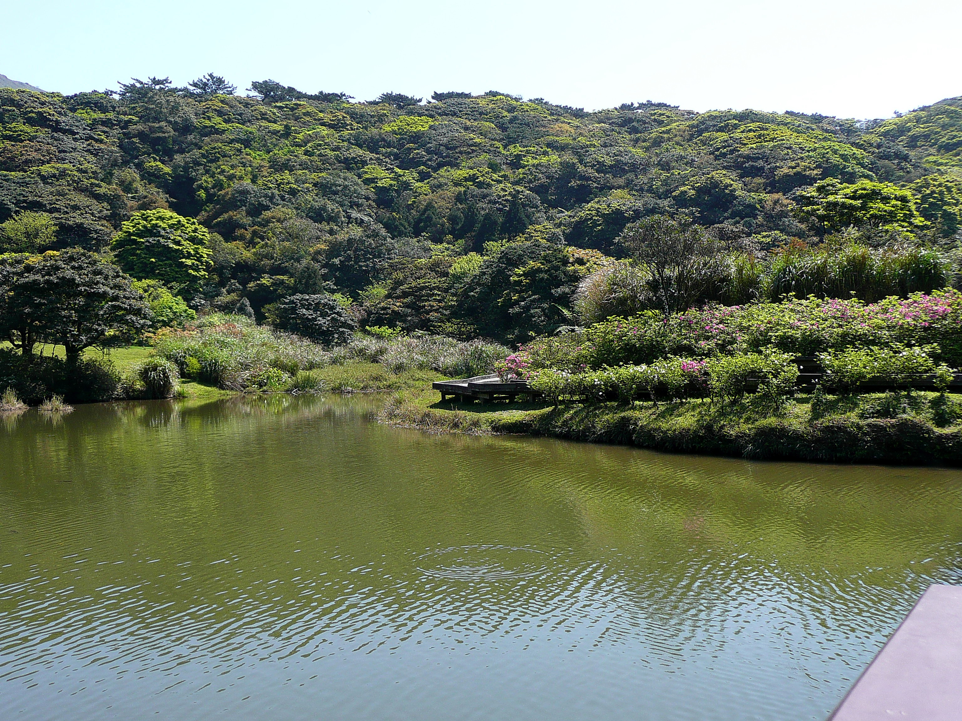 大屯自然公園 Datun Nature Park